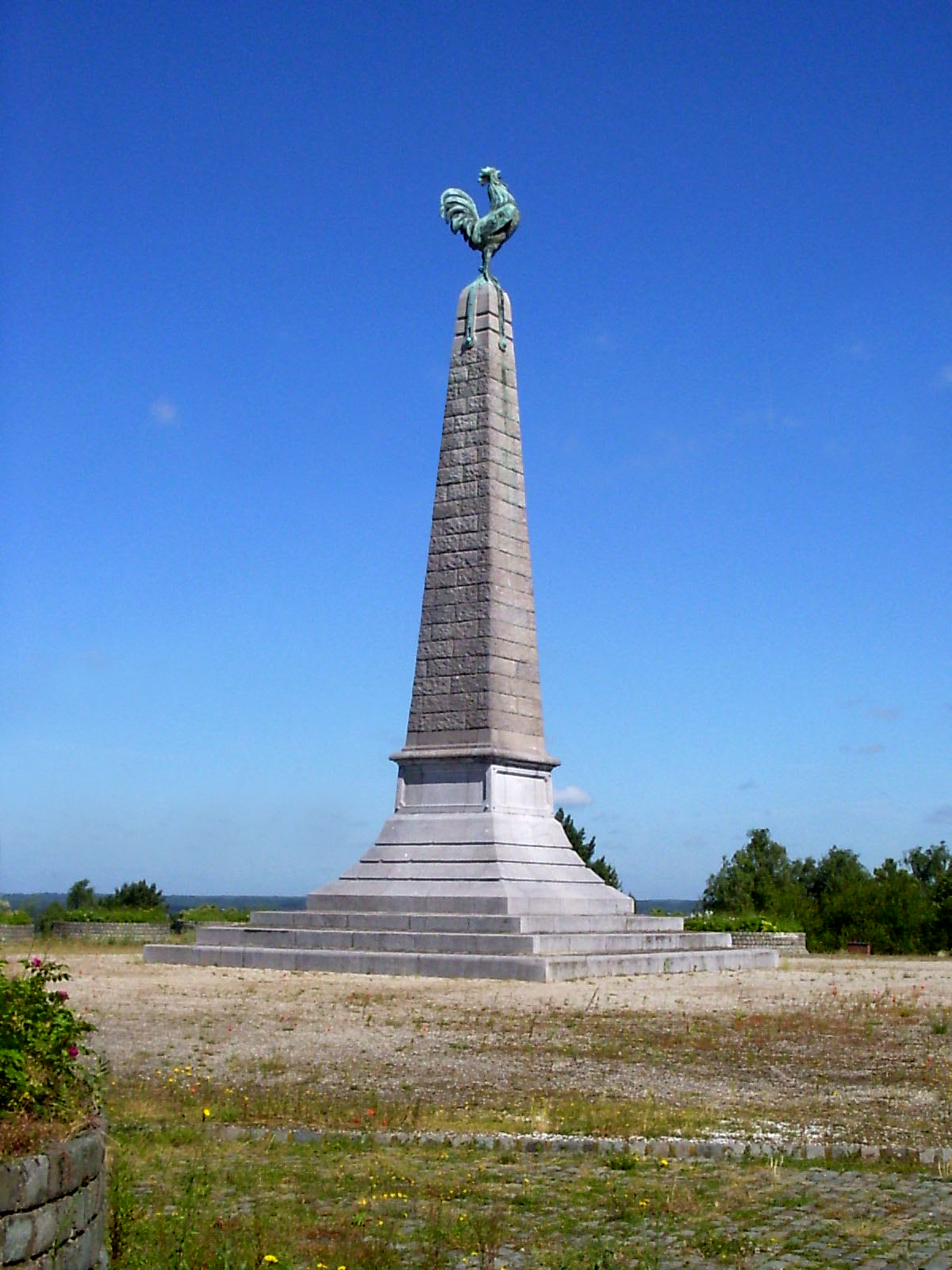 Jemappes (Belgium), Le coq de Jemappes.